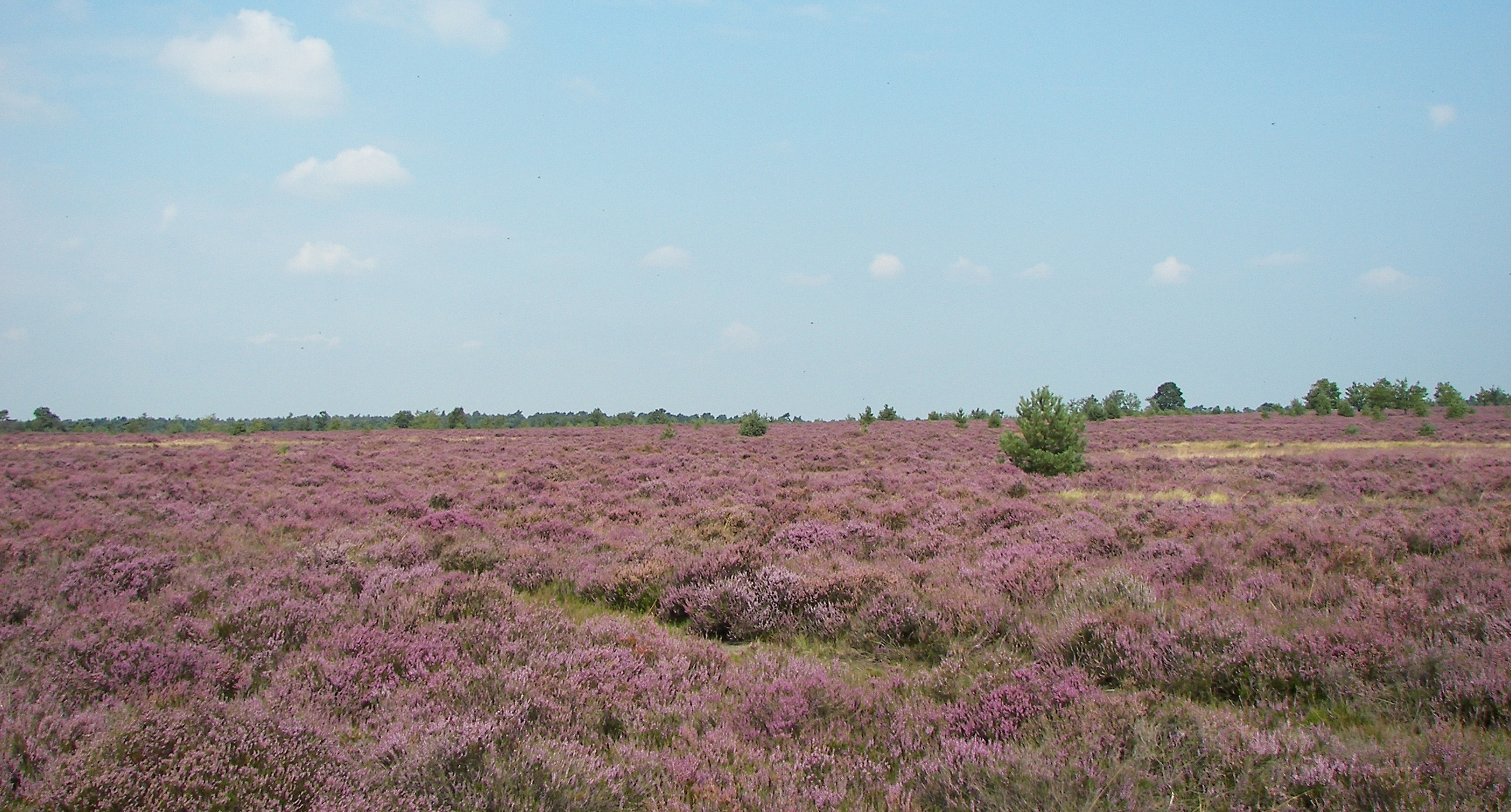 Osterheide bei Schneverdingen